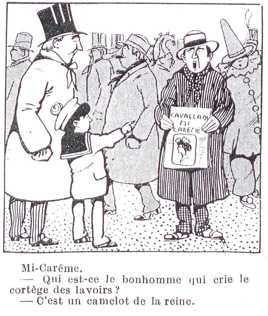 Dessin à propos du cortège de la Mi-Carême. Blague à propos des Camelots du Roi, organisation politique royaliste française très connue à l'époque, et des Camelots (vendeurs à la sauvette), de programmes où apparaît la Reine de la Mi-Carême. A noter qu'en 1909 on appelle encore le cortège de la Mi-Carême "cortège des lavoirs", alors que cela fait des années que ce ne sont plus les lavoirs qui y sont les vedettes.